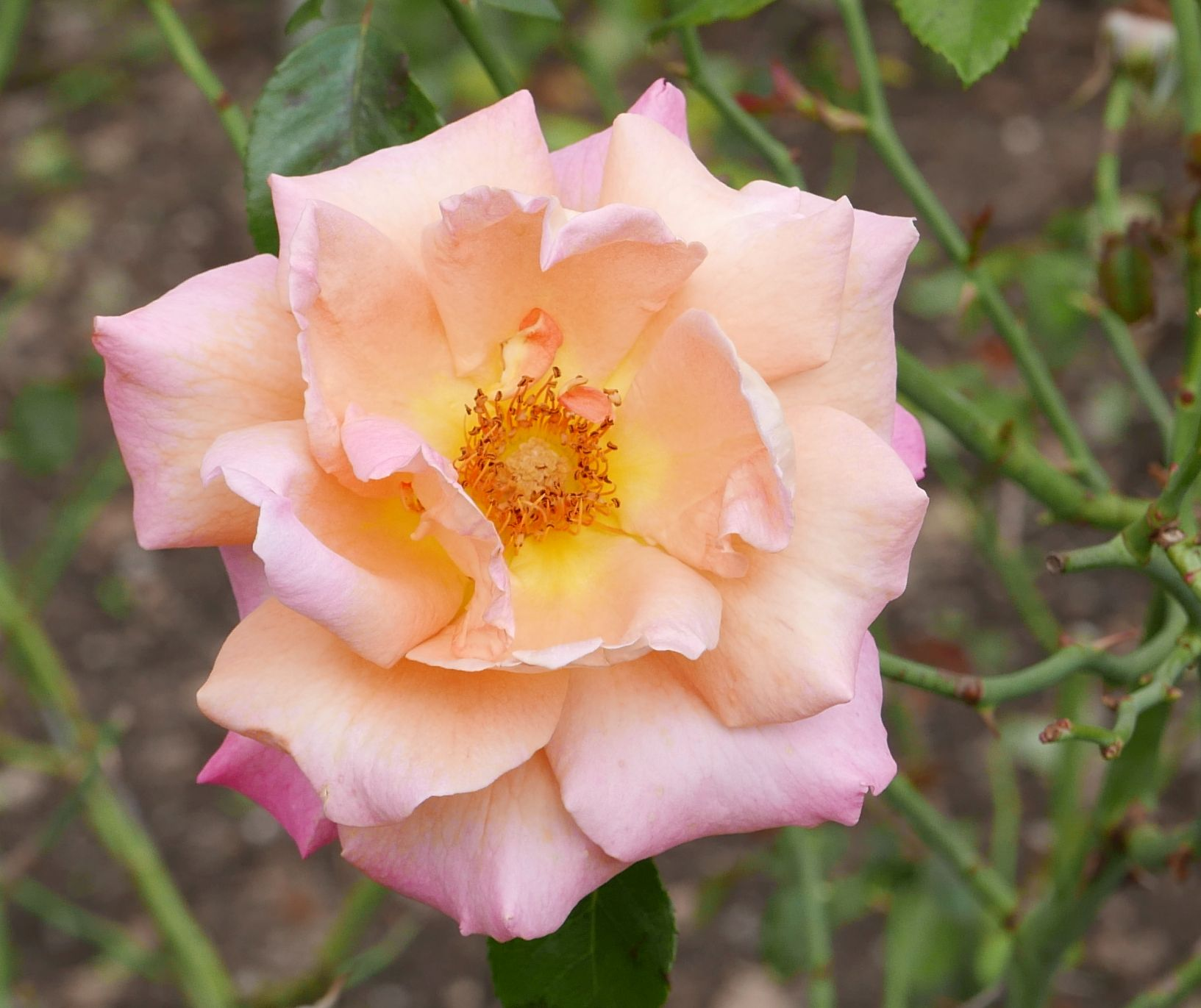 Rosa 'Freisinger Morgenröte' Kordes 1988, Rosarium Sangerhausen, August 2017